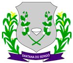 Brasão do município de Santana do Seridó, estado do Rio Grande do Norte, Brasil.